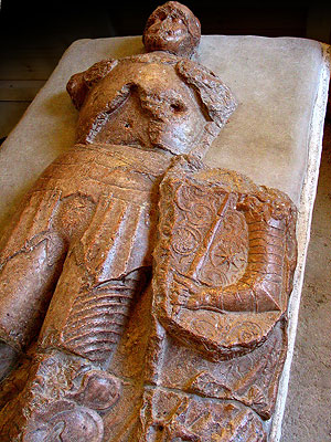 Placa funerara a lui Pavel Chinezu din cetatea Kinizsivar, Nagyvazsony, Ungaria. Fotografie - Alexandra Croitoru